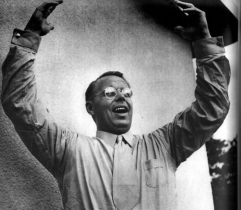 Einar Ekberg